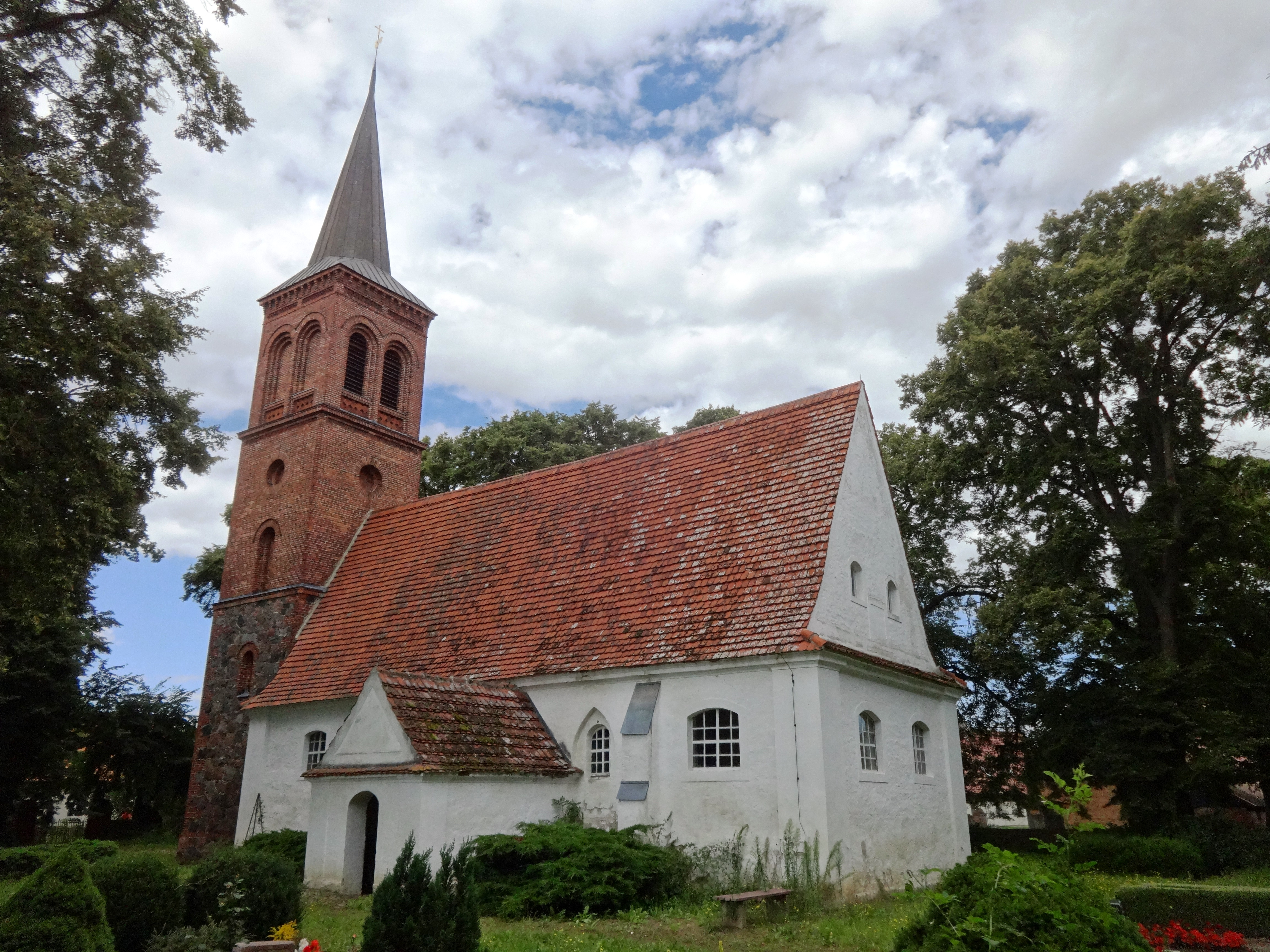 Die Kirche in Alt Teterin ist ein Sakralbau aus dem 15. Jahrhundert in Alt Teterin, ein Ortsteil der Gemeinde Butzow. Im Innern gehören unter anderem ein Taufbecken aus dem 14. Jahrhundert sowie mehrere alte Grabplatten vor dem Altar aus der Zeit um 1400.